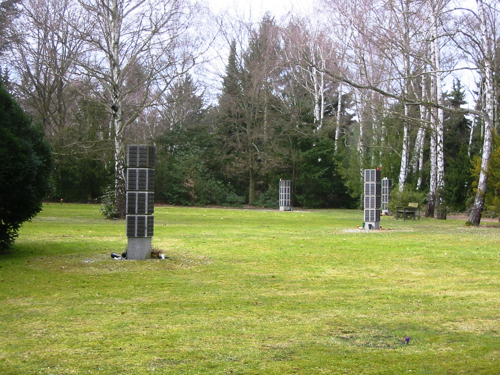 Säulenförmige Urnengräber auf dem Berliner Heidefriedhof im Bezirk Tempelhof-Schöneberg